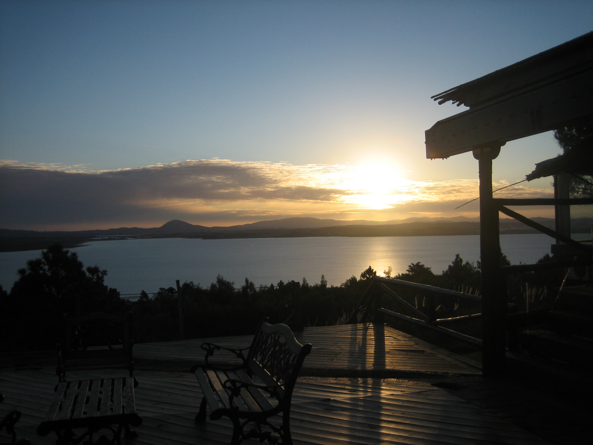 Atardecer en la laguna del sauce, foto tomada desde las cumbres